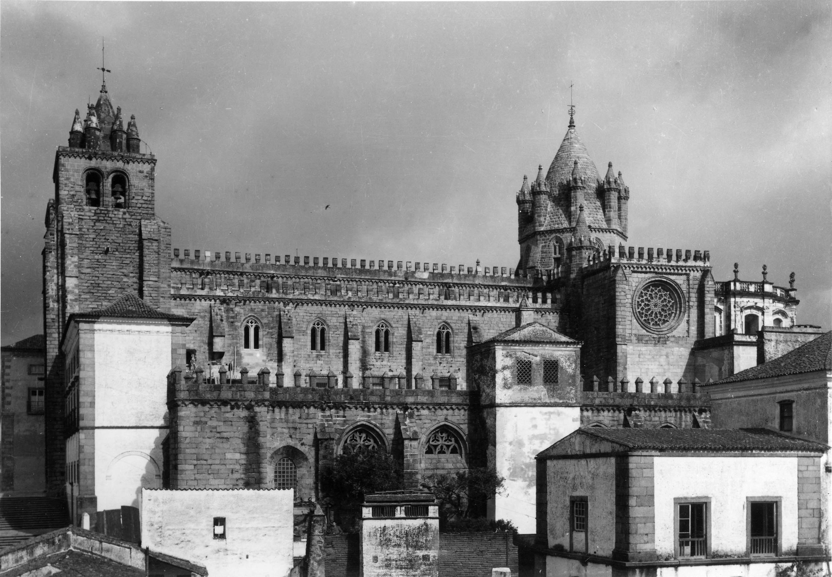 Fachada lateral. Fotógrafo: Mário Novais, 1899-1967. Orientador científico: Mário Tavares Chicó, 1905-1966. Data aproximada da produção da fotografia original: 1954. [CFT015.080.ic]